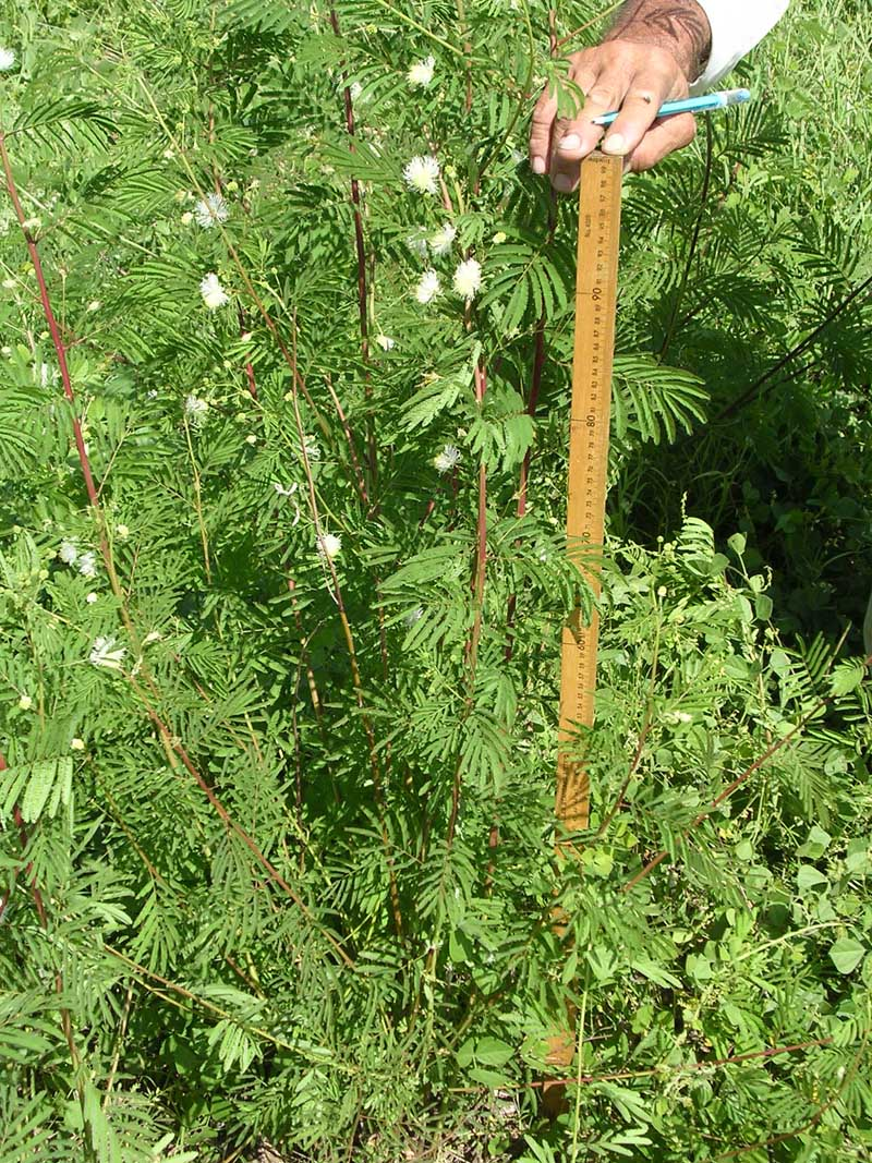 Chris Gardiner